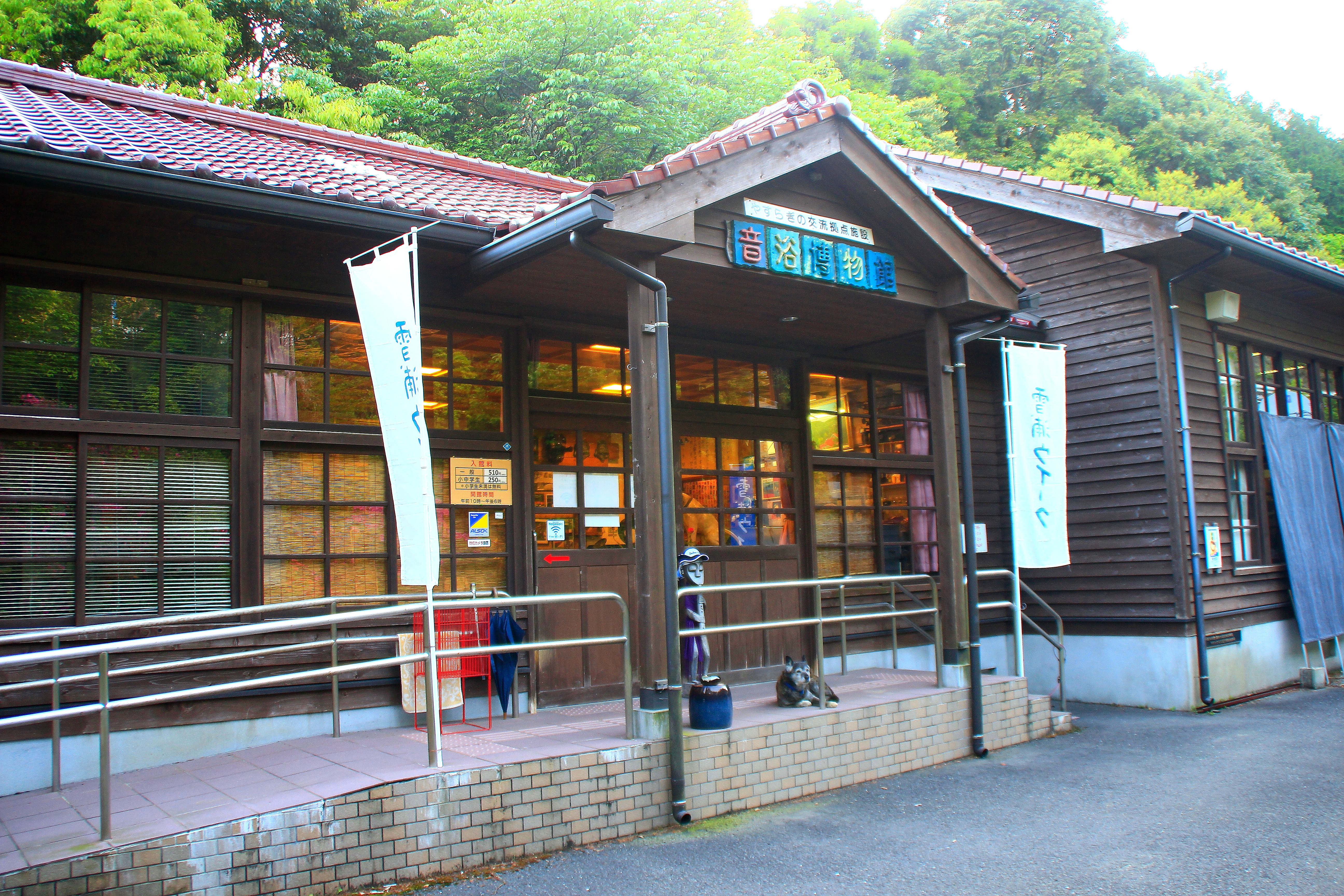 西海市大瀬戸にあるレコードの博物館